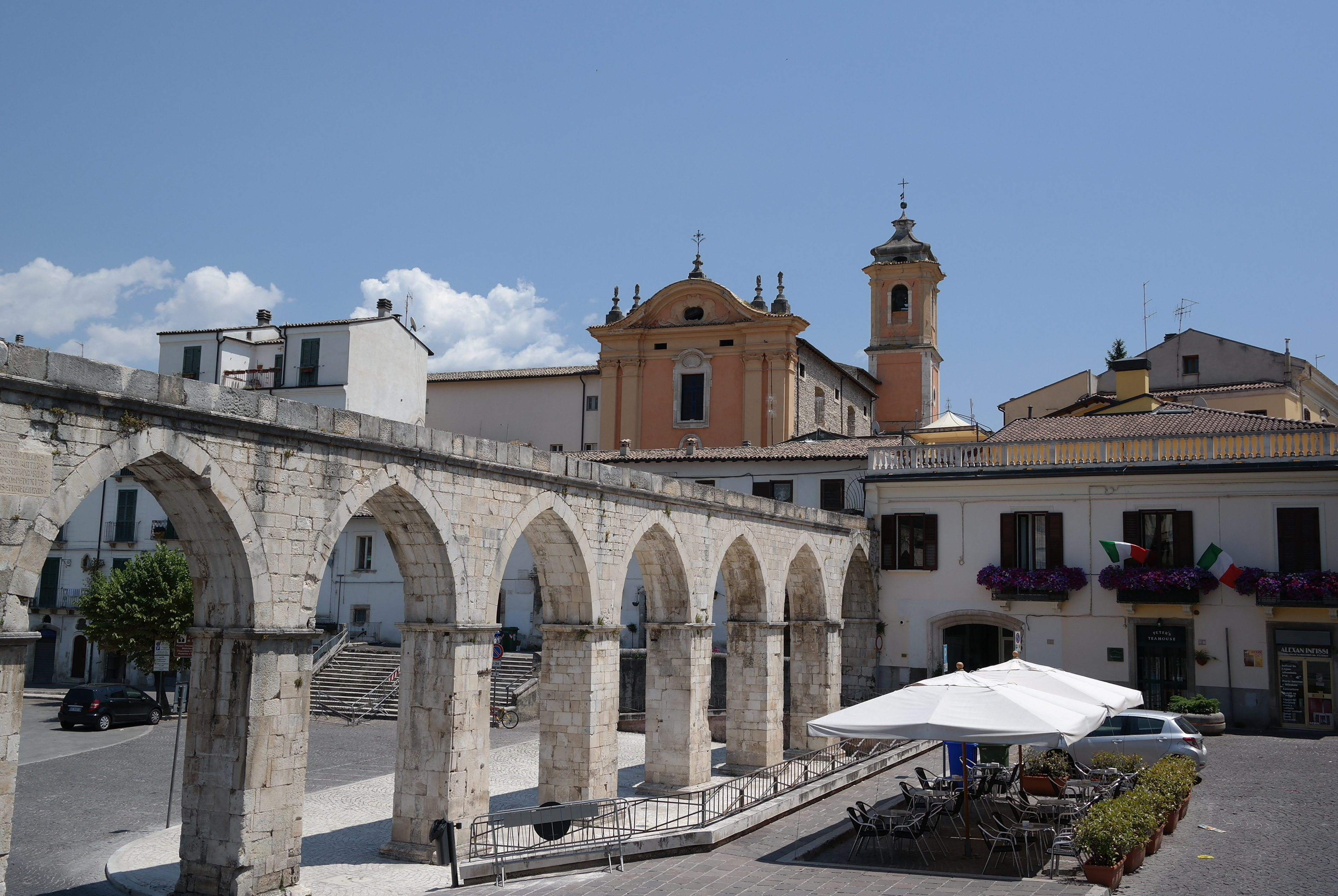 Acquedotto medievale a Sulmona